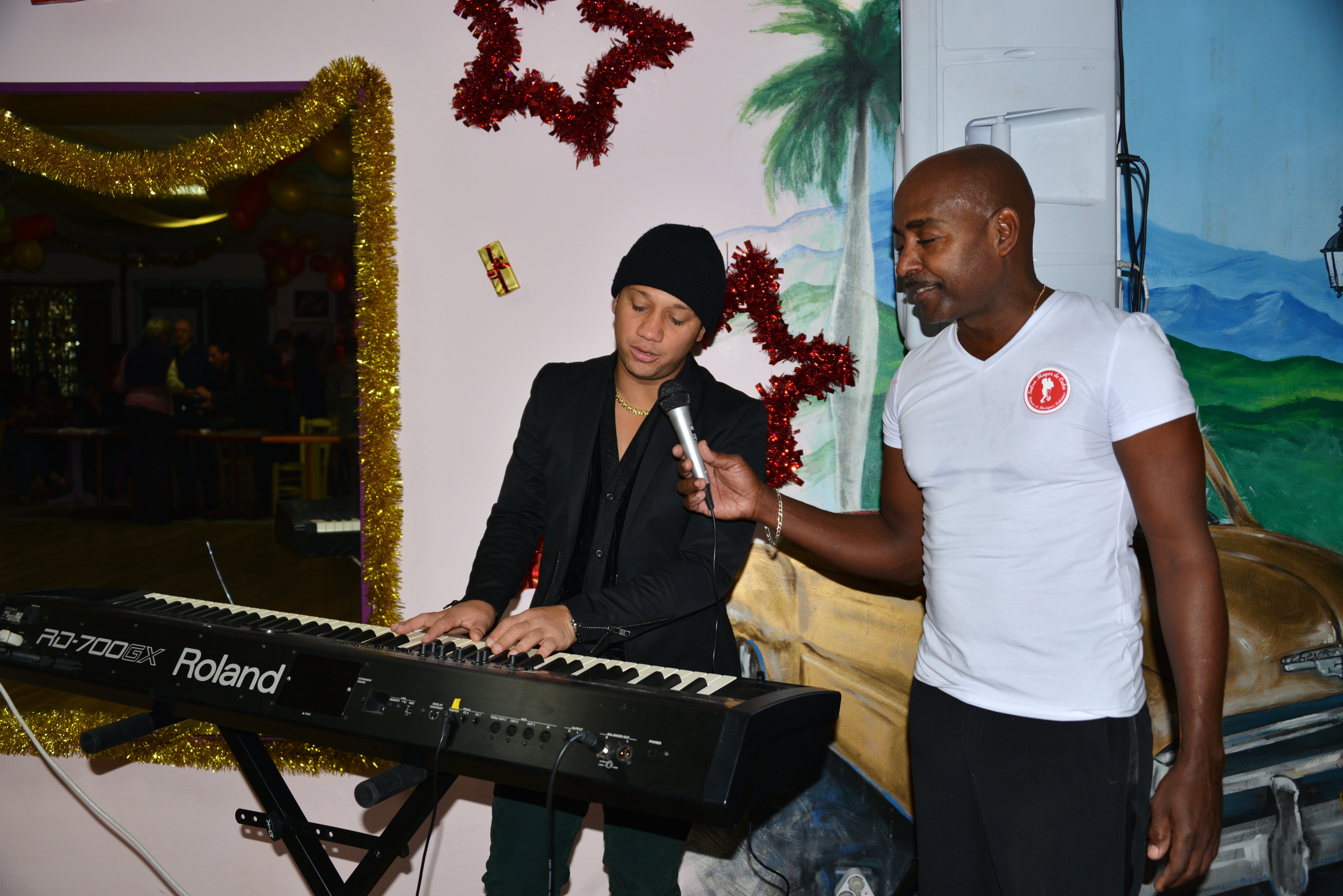 Maikel Blanco Cuevas au Cuba Tropicana à La Rochelle en janvier 2013. Maikel Blanco au clavier et en train de chanter (micro tenu par Rey Martinez). Soirée dansante au Cuba Tropicana en l’ honneur de Maikel Blanco Cuevas (Maykel Blanco) venu en France pour la présentation de son nouvel album « A Toda Maquina » et la préparation de sa tournée de concerts en juillet 2013. Maikel Blanco est un auteur-compositeur cubain de timba. Le Cuba Tropicana est un établissement d’ enseignement des danses latines et un bar géré par Rey Martinez Piloto et Deborrah Fronteau. La Rochelle, Charente Maritime, France.